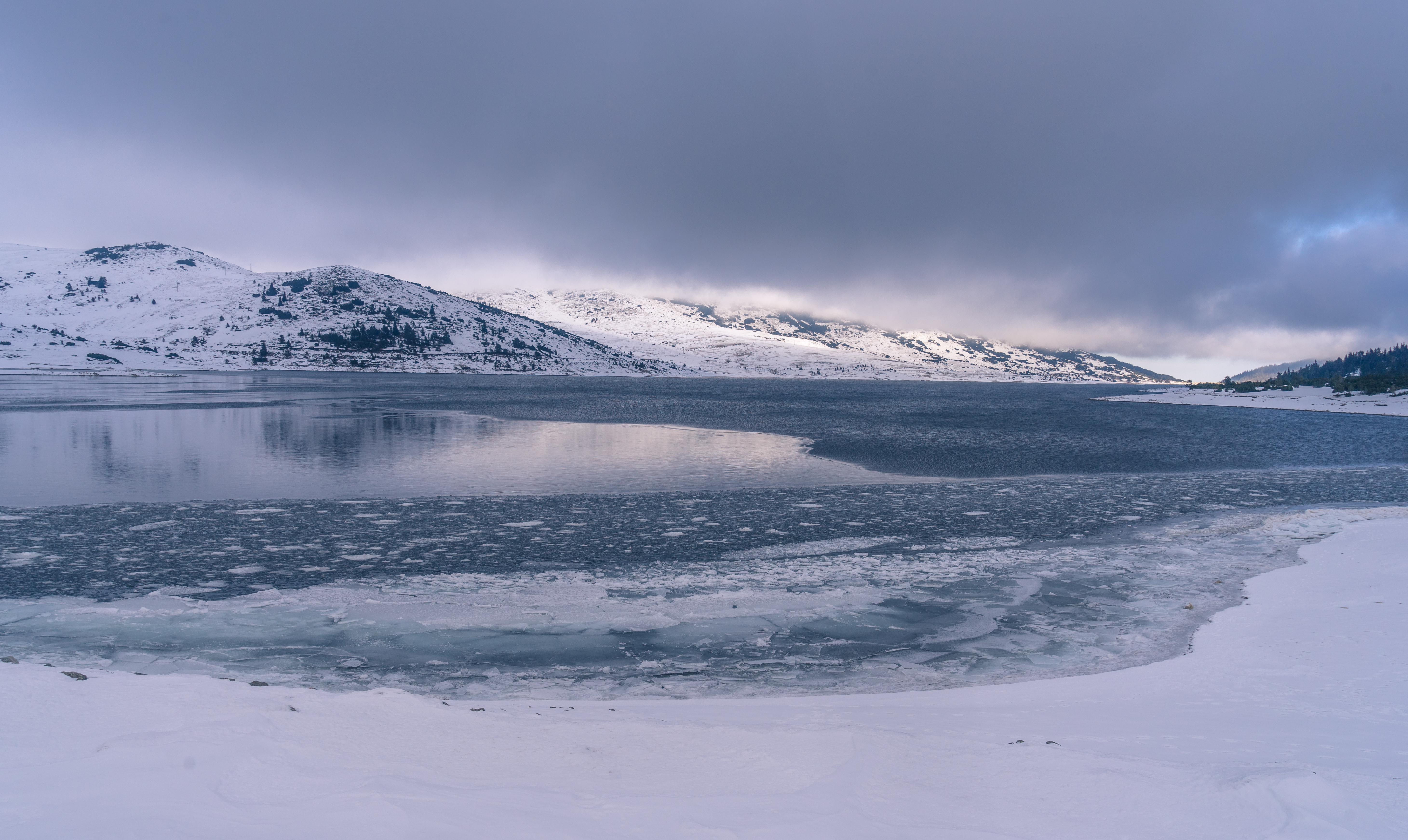 Язовир Белмекен, национален парк Рила